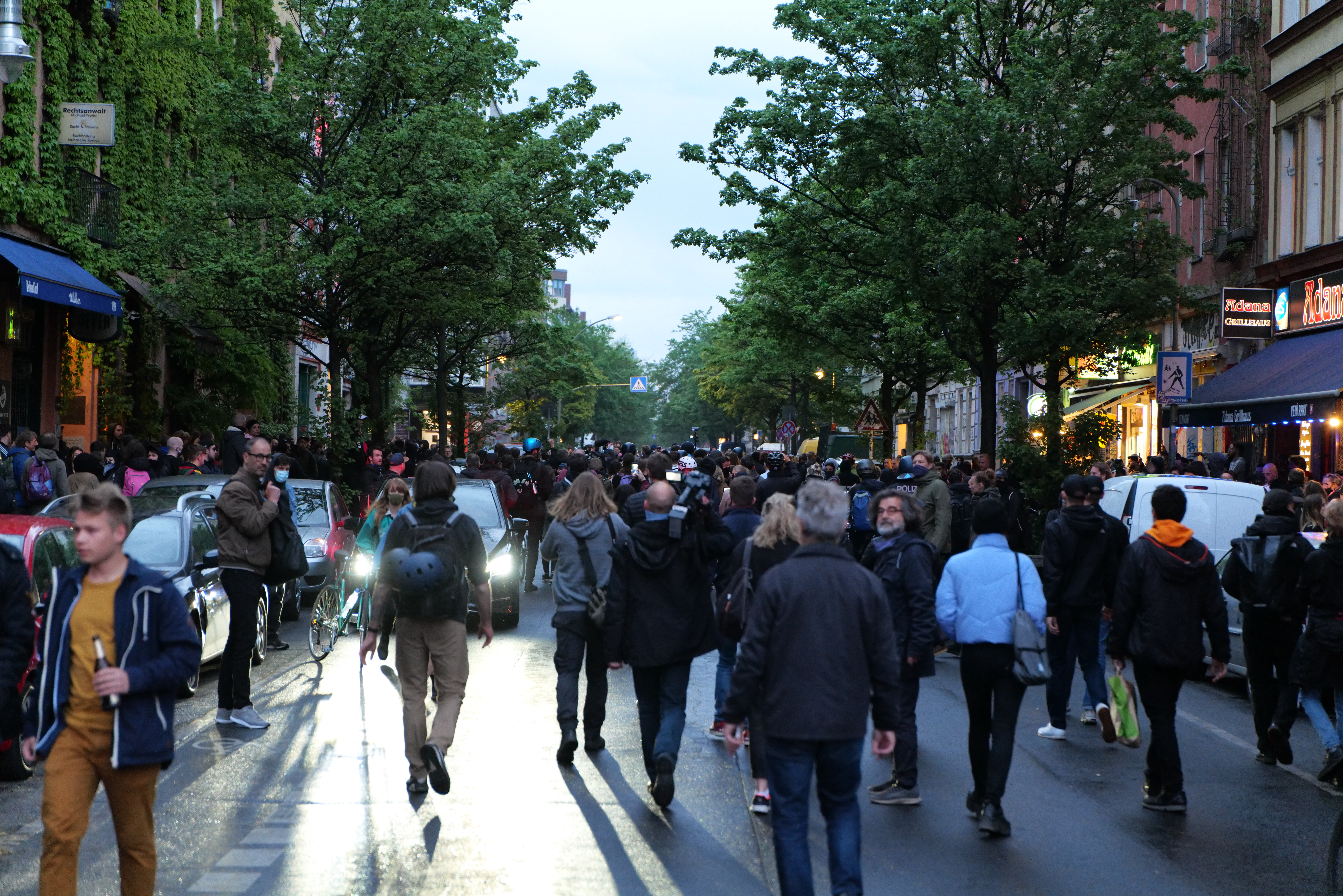 Proteste am ersten Mai 2020 in Berlin-Kreuzberg.